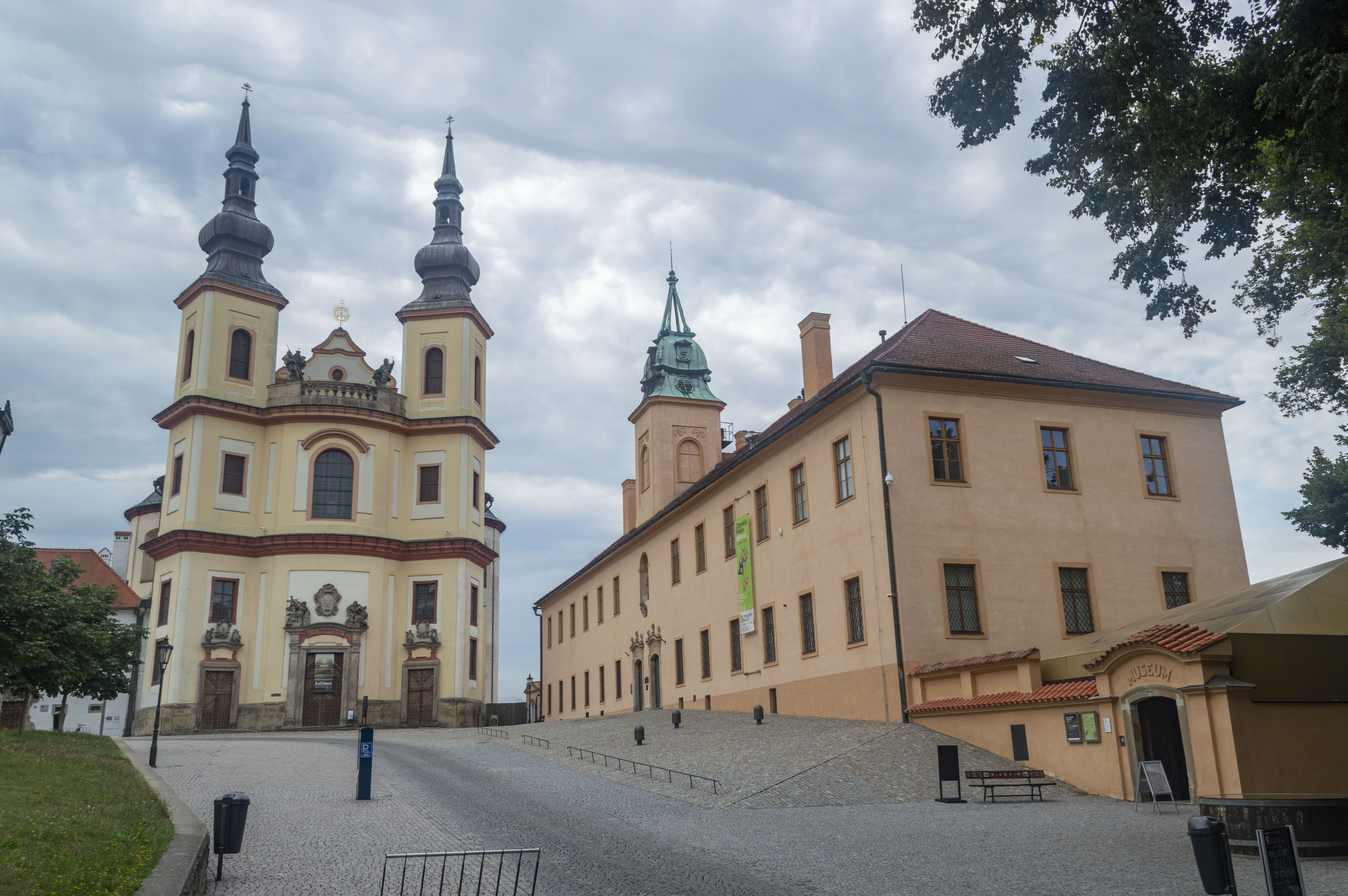 Kostel Nalezení svatého Kříže, Piaristické gymnázium (dnes Regionální muzeum) - pohled ze severu